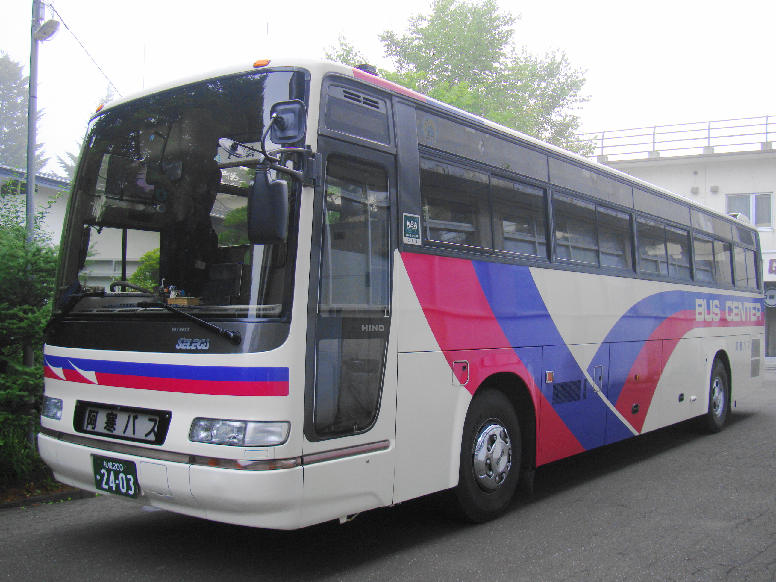 BUS CENTER